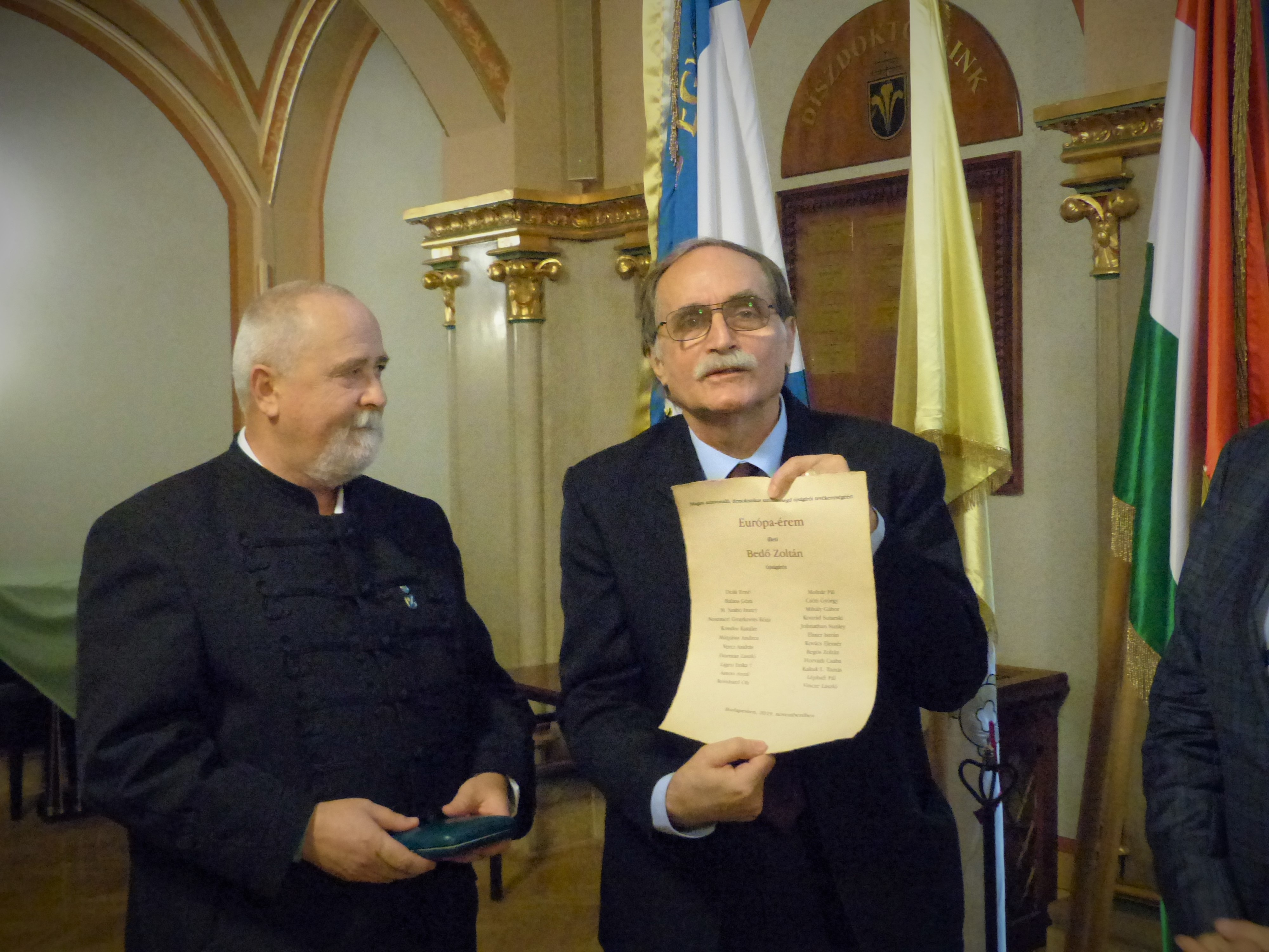 Bedő Zoltán, Molnár Pál. A magyarok jogvédelme a Kárpát-medencében konferencia. A felvétel 2019. november 28-án, csütörtökön készült a Pázmány Péter Egyetemen, Budapesten.